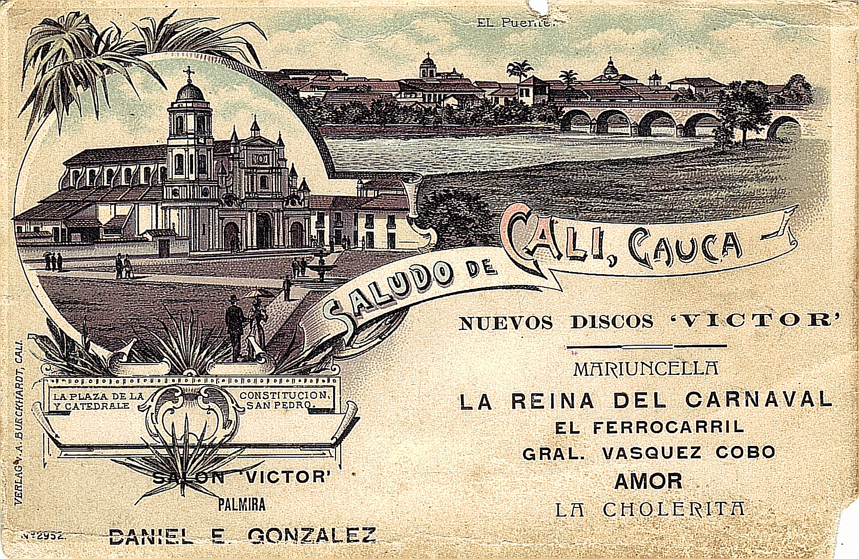 Postal de Cali cuando aún no se había formado el Departamento del Valle del Cauca.